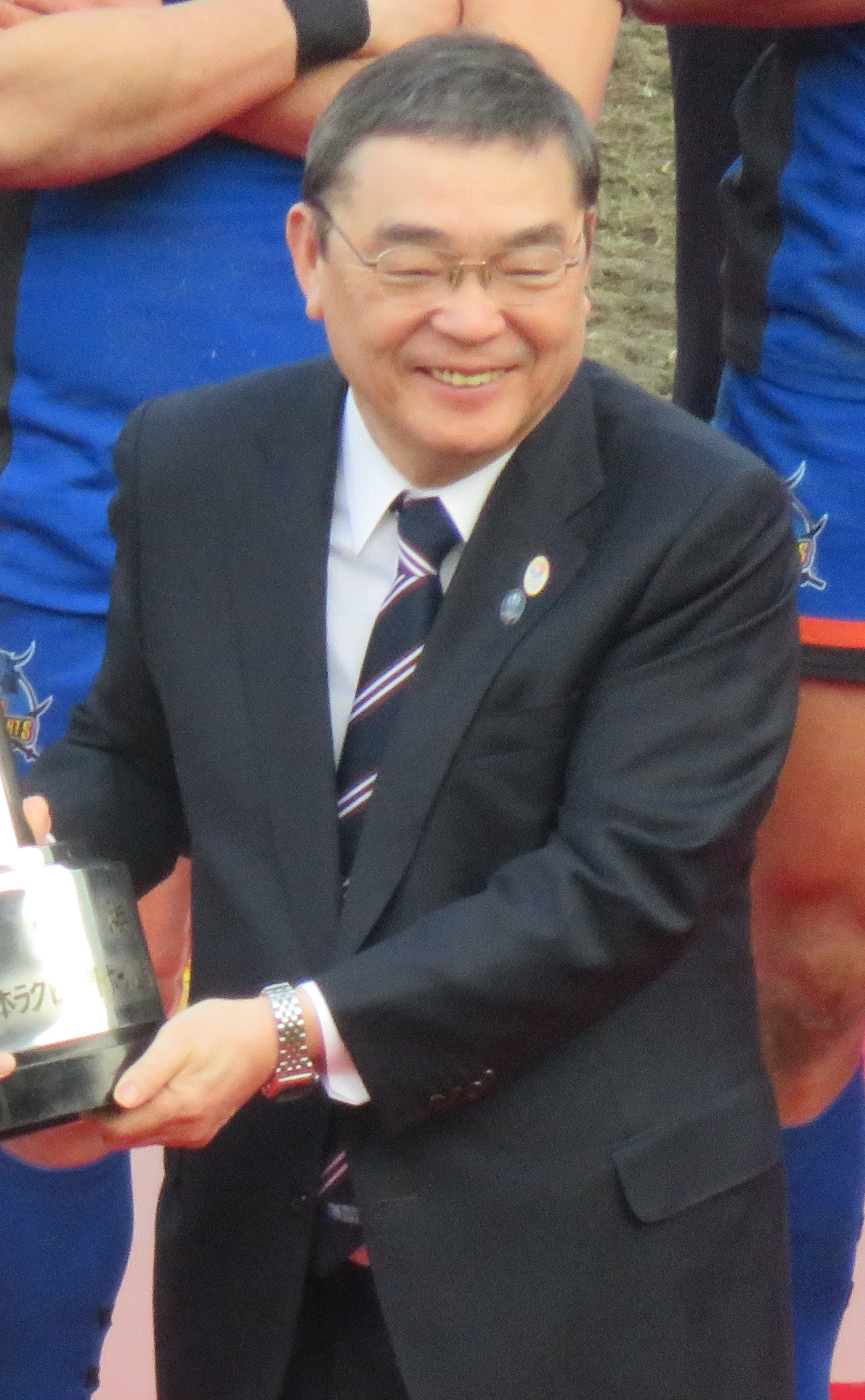 第53回日本ラグビーフットボール選手権大会での、日本放送協会の籾井勝人会長